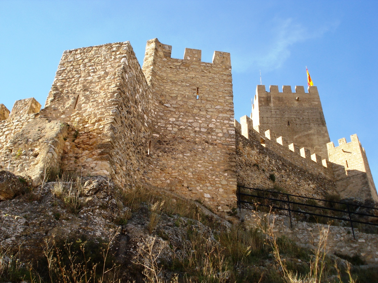 Castell de Banyeres.